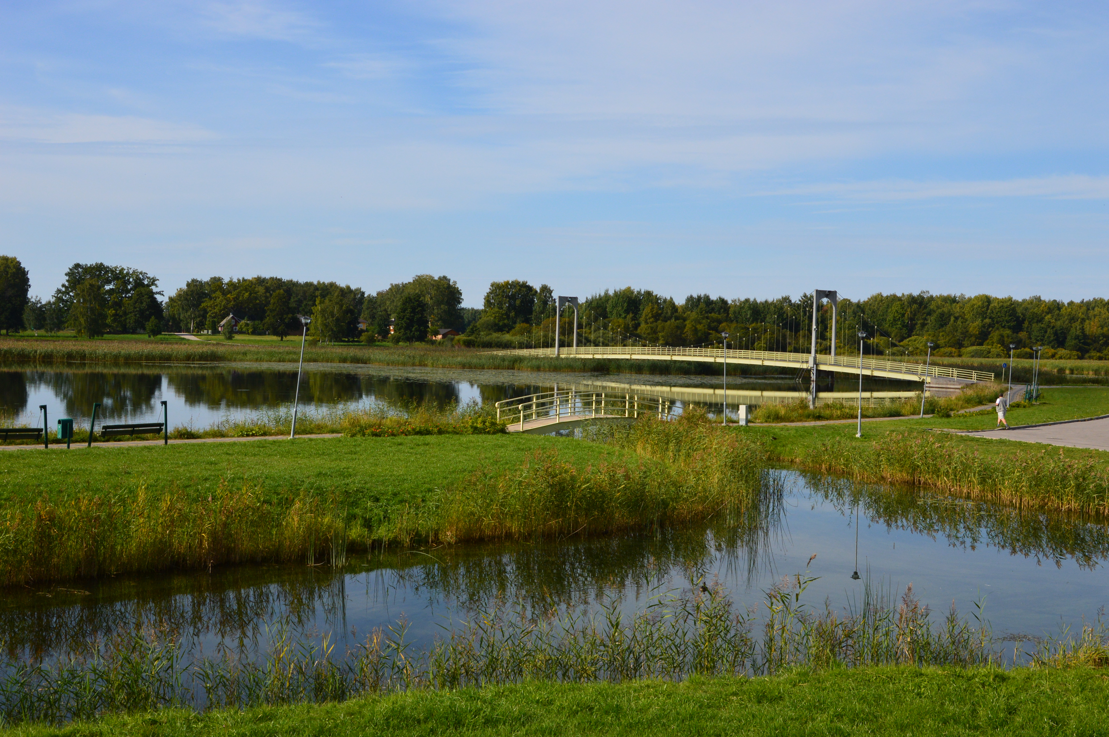 Tamula järv